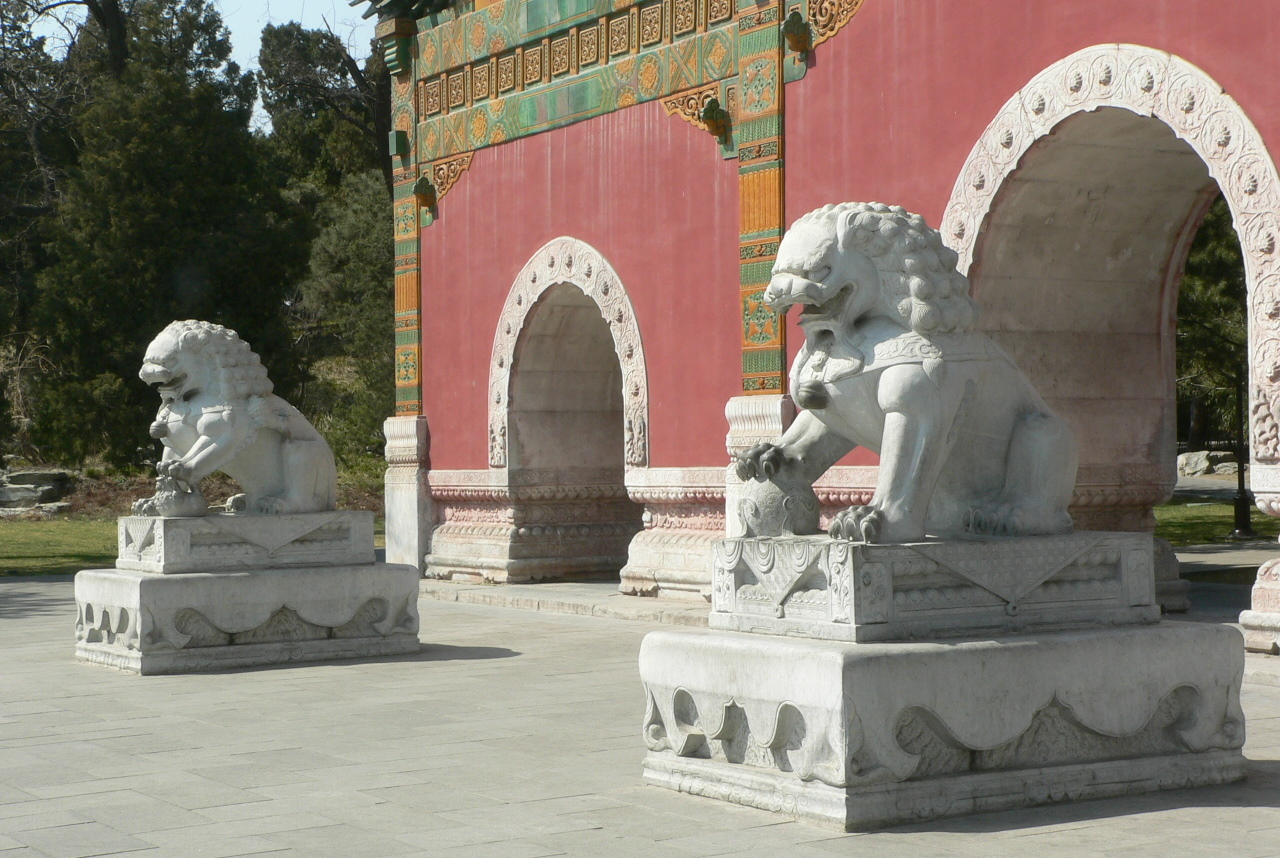 牌坊前的zh:石狮子 用心阁于2005年3月29日拍摄于zh:北海公园须弥春牌坊前/Imperial guardian lions in beihai park, beijing